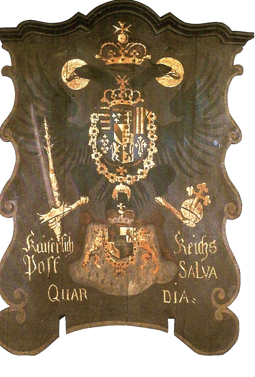 Posthausschild der Kaiserlichen Reichspost, bemalte Holztafel